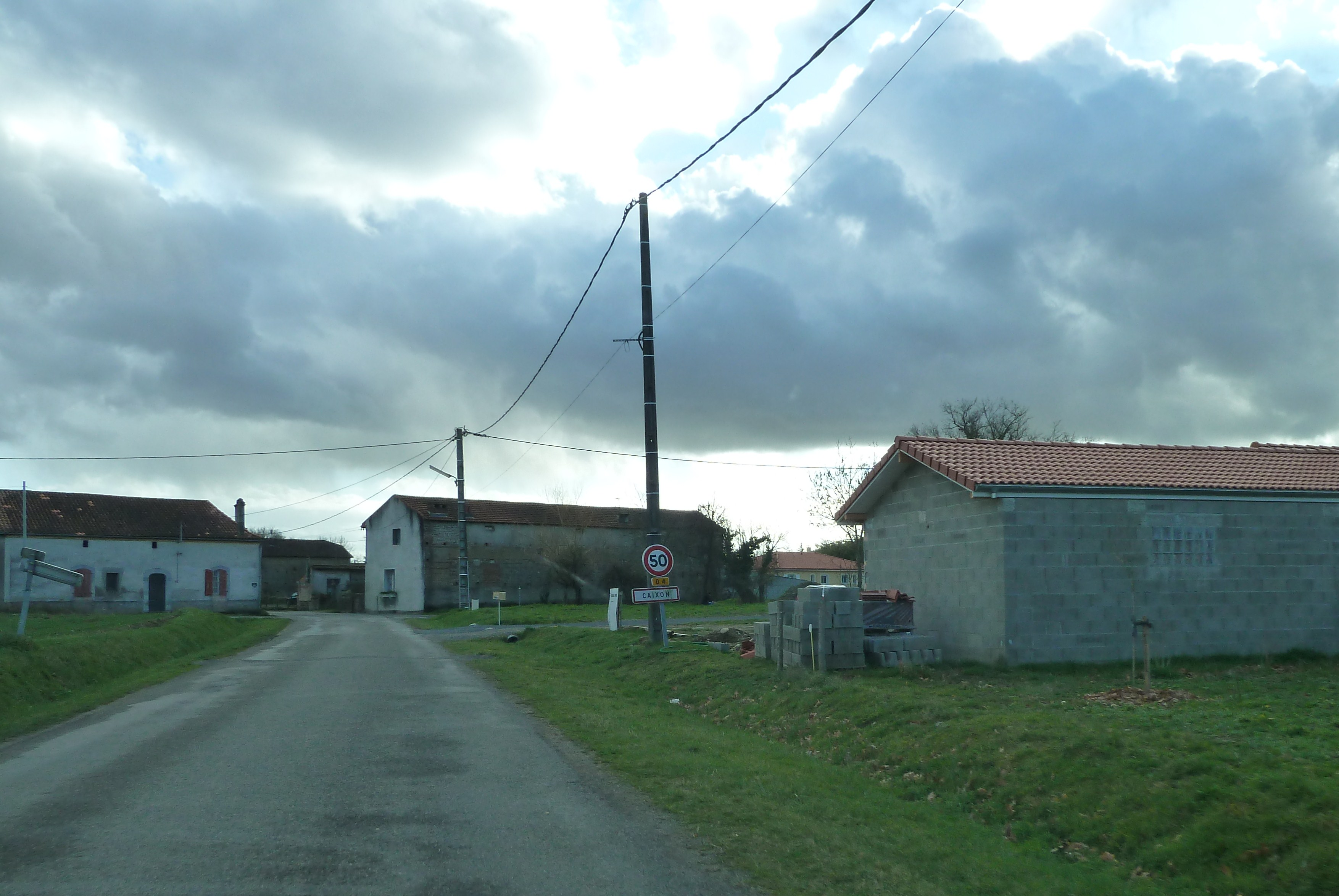 Entrée dans Caixon